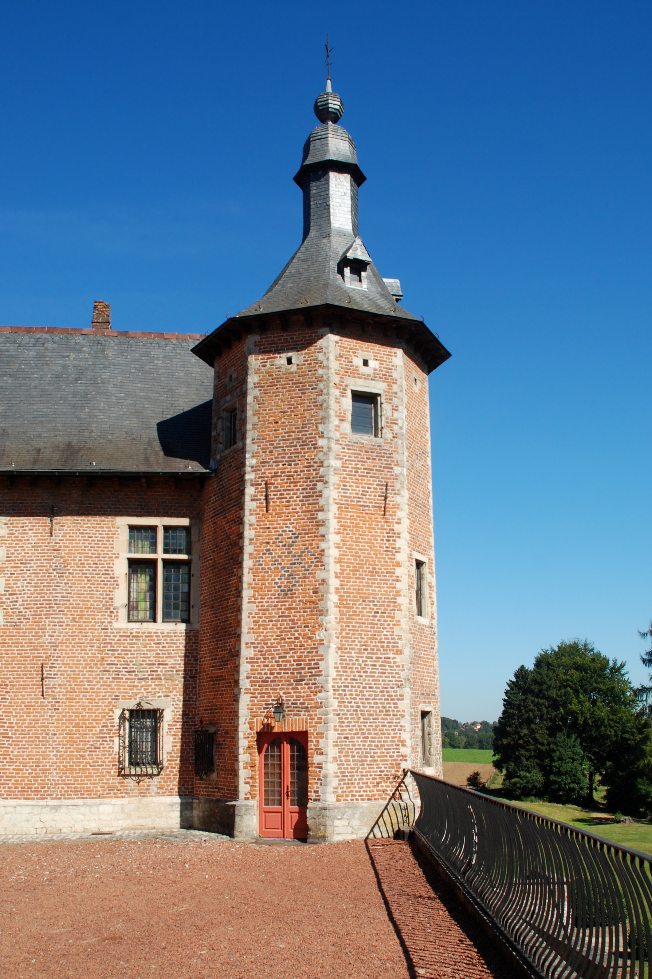 Belgique - Brabant wallon - Château de Rixensart